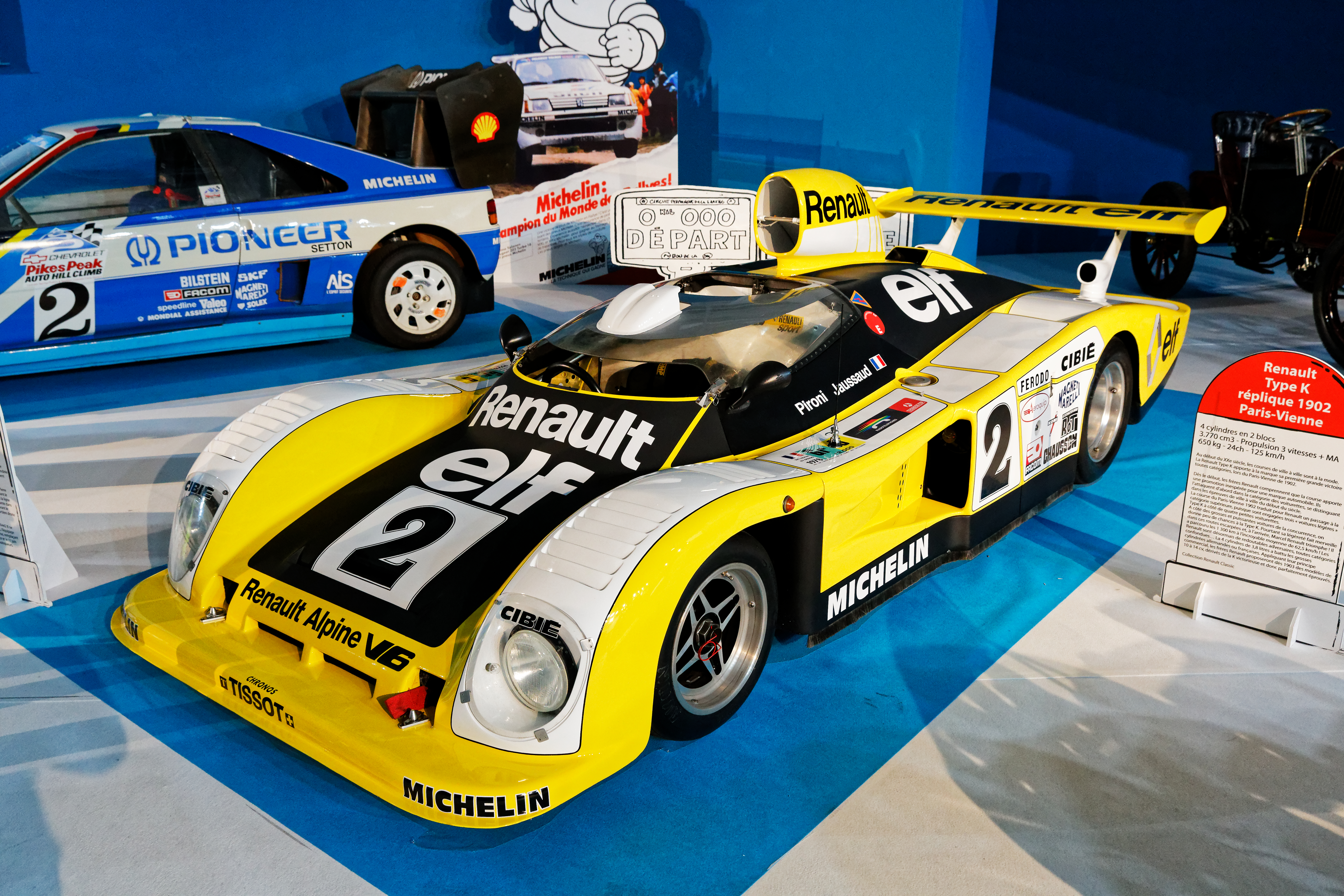 Une Renault-Alpine A442B exposée lors du mondial de l'automobile de Paris 2018.